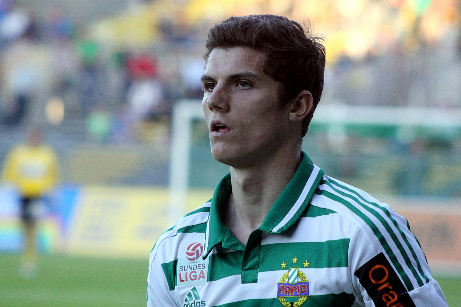 Meisterschaftsspiel der österreichischen Bundesliga: SV Mattersburg gegen SK Rapid Wien am 18. Mail 2013 (2:0)] im Mattersburger Pappelstadion.] - Das Foto zeigt Marcel Sabitzer (SK Rapid Wien).